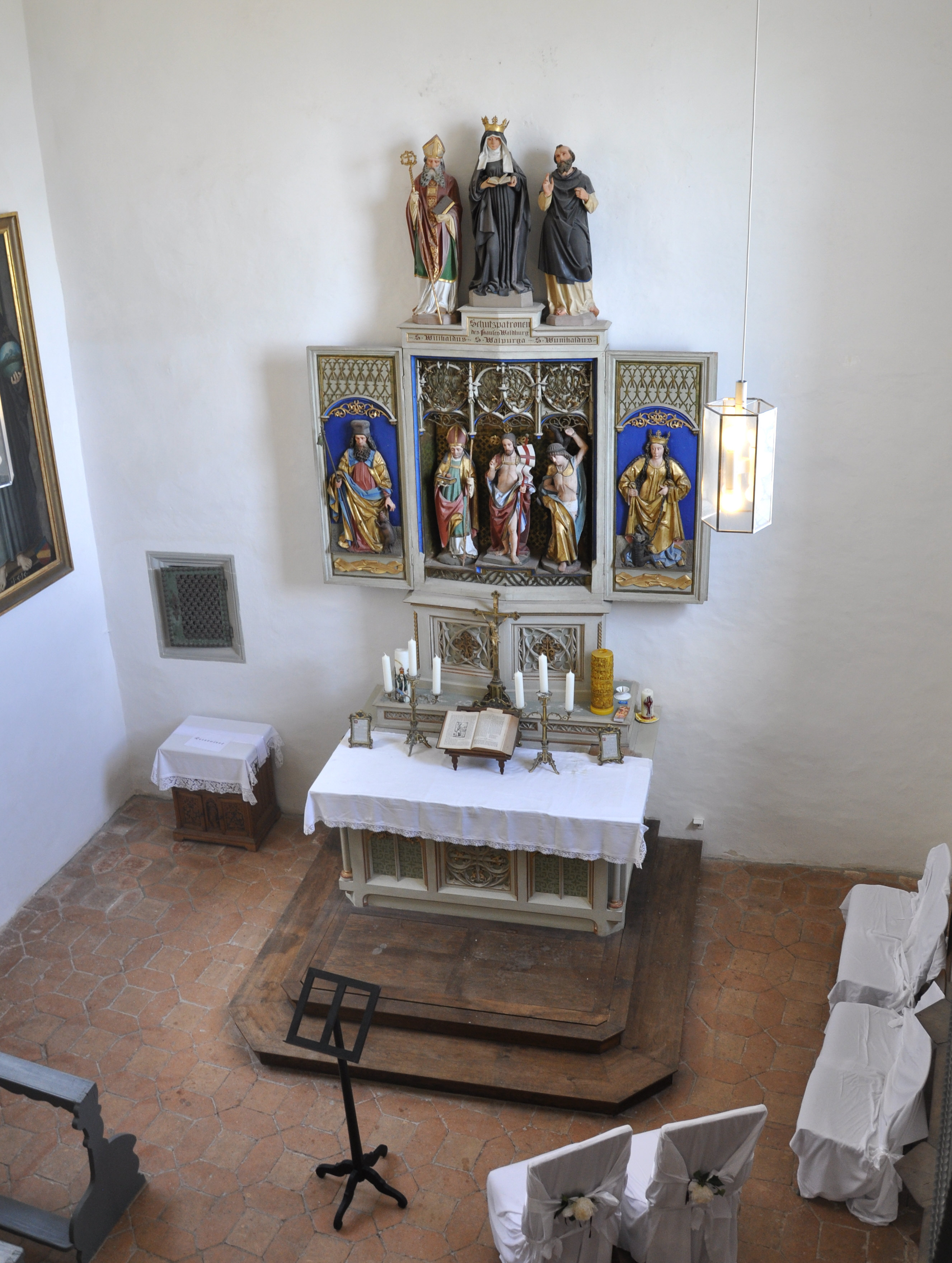 Burg Waldburg (Württemberg), Burgkapelle, Blick von der Empore zum Altar (im 19. Jh. geschaffen aus Teilen eines spätgotischen Altars um 1500 und neugotischen neuen Teilen)